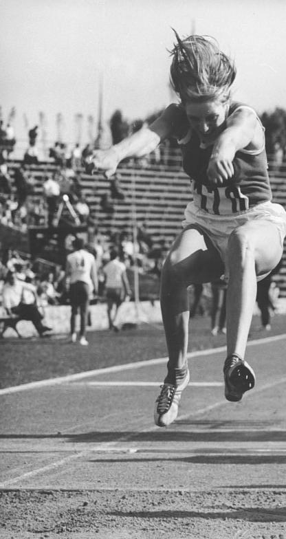 Burghild Wieczorek Zentralbild Wendorf ma-od 7.5.1967 Leipzig: Leichtathletik-Sportfest - Burghild Wieczorek sprang 6,24 m. Bei einem Leichtathletik-Sportfest des SC DHfK am 6.5.1967 in Leipzig erreichte Burghild Wieczorek (SC DHfK-Archivfoto) im Weitsprung mit 6,24m eine neue Jahresbestleistung.